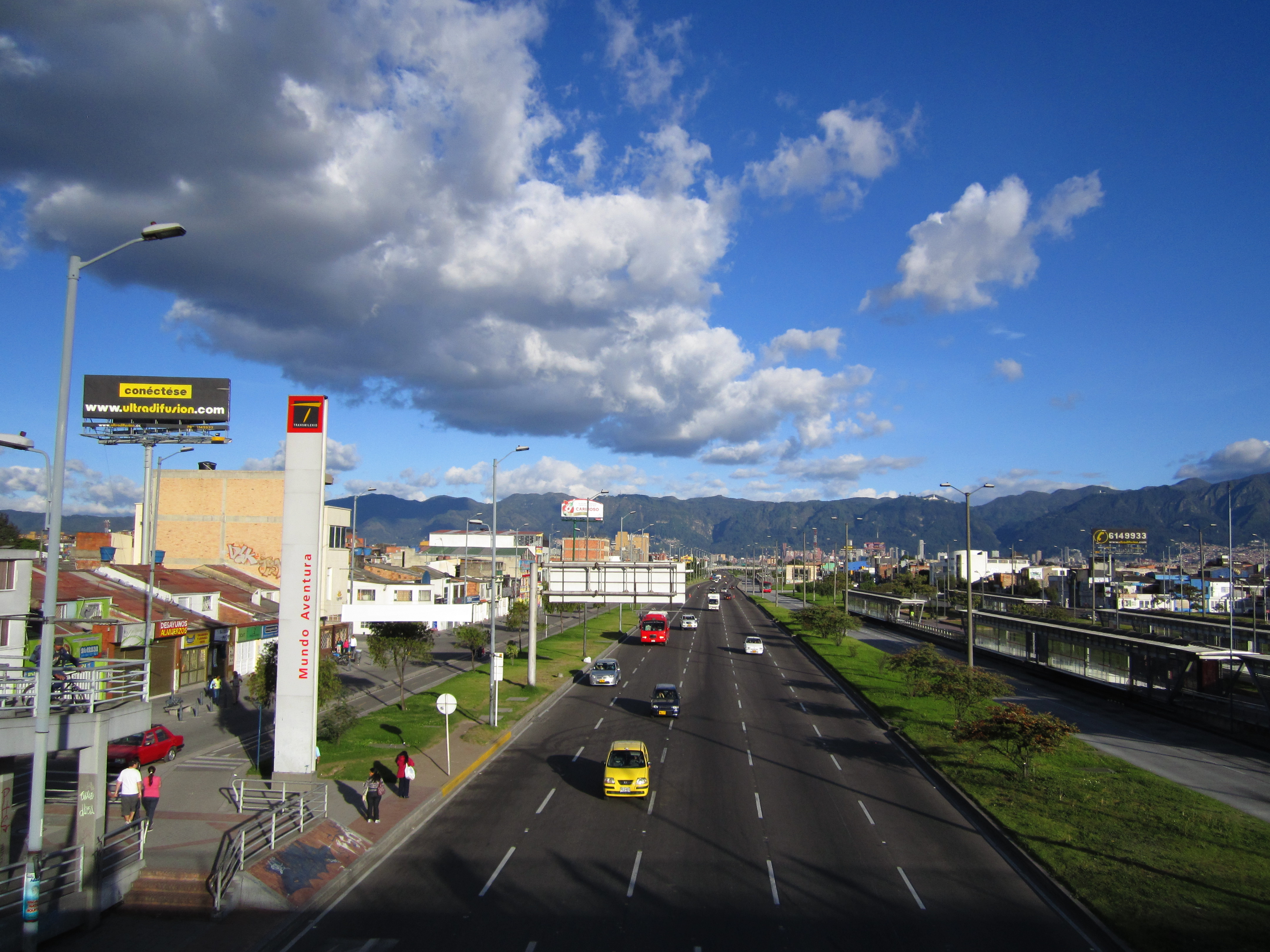 Avenida de las Américas con carrera 71 C, estación Mundo Aventura del sistema Transmilenio. Localidad de Kennedy.